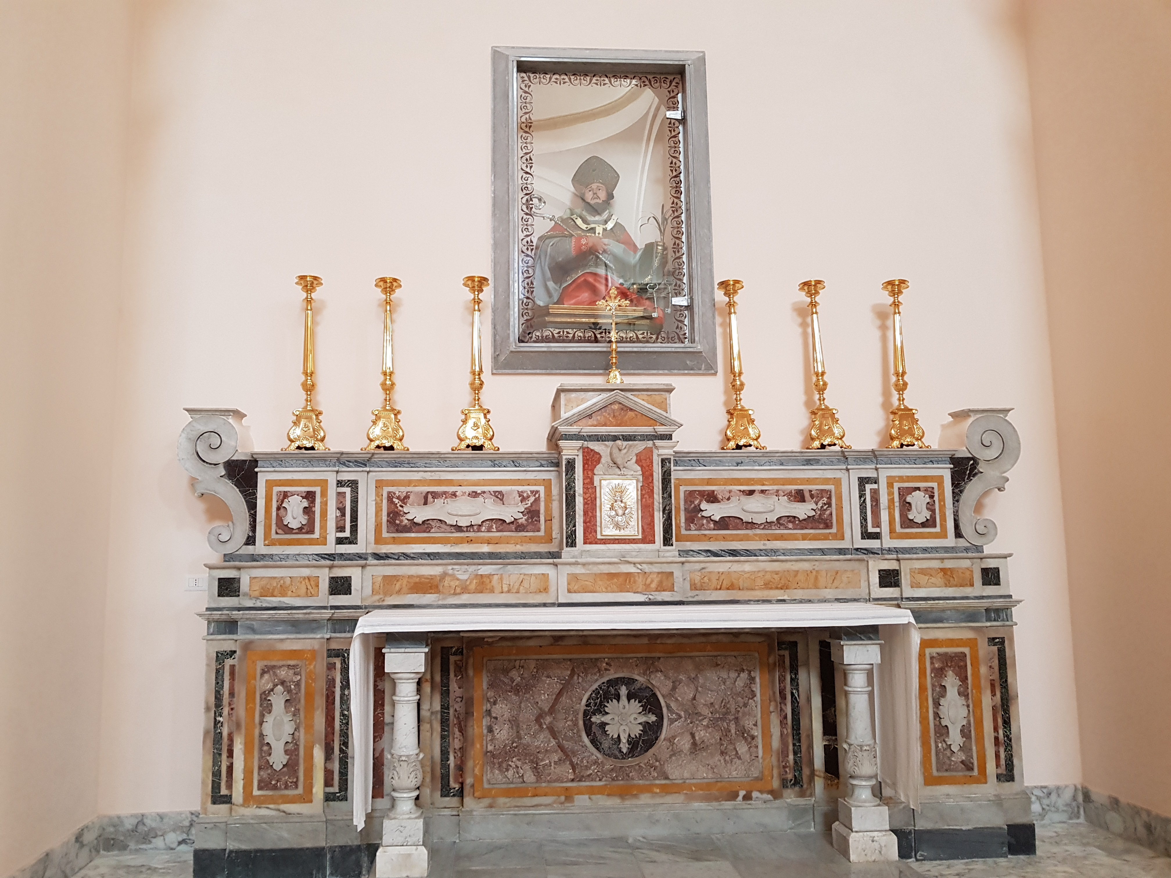 Altare San Tommaso Chiesa Madre Mottola